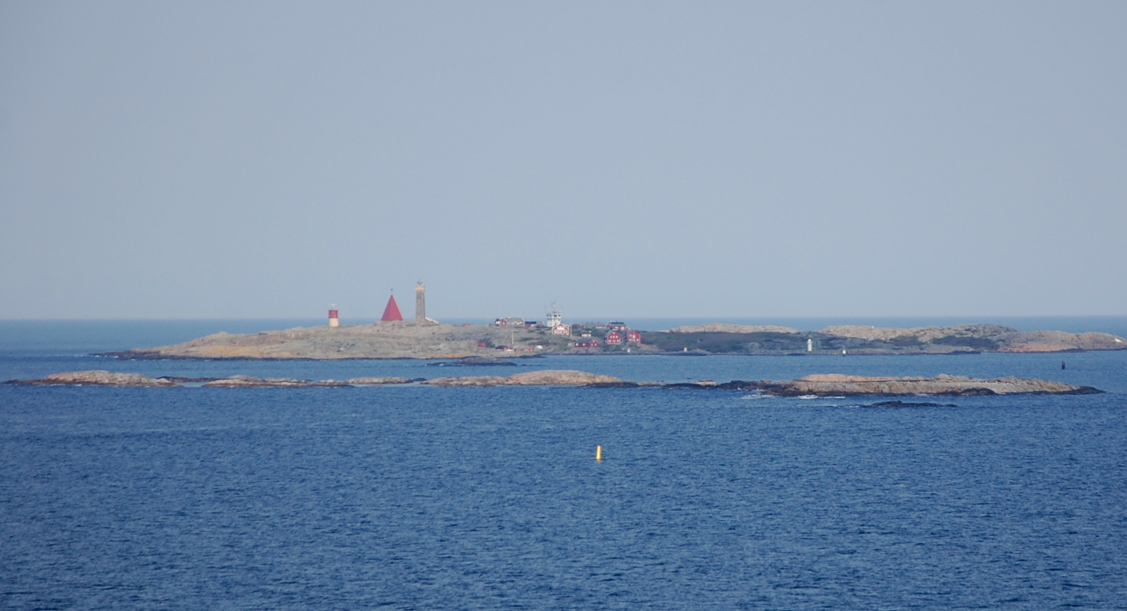 Insel im Schärengarten vor Göteborg